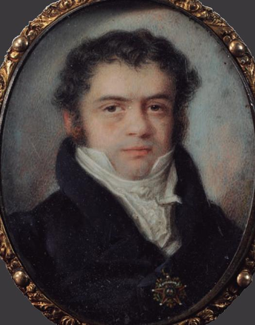 Retrato de Mariano Egaña ca. 1827. Gouache sobre marfil 5,5 x 4,5 cm.